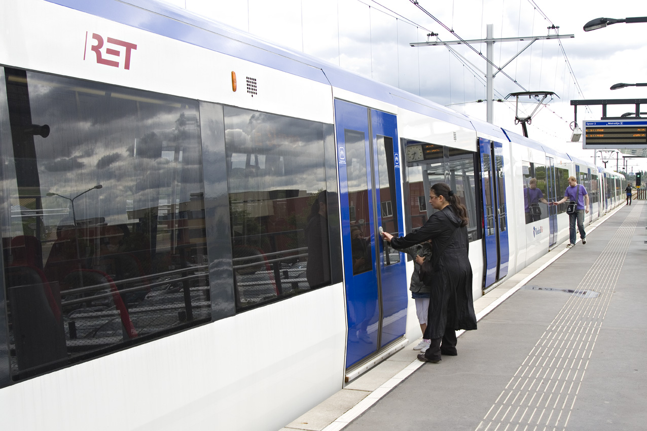 Rodenrijs RandstadRail station; part of Rotterdam Metro line E